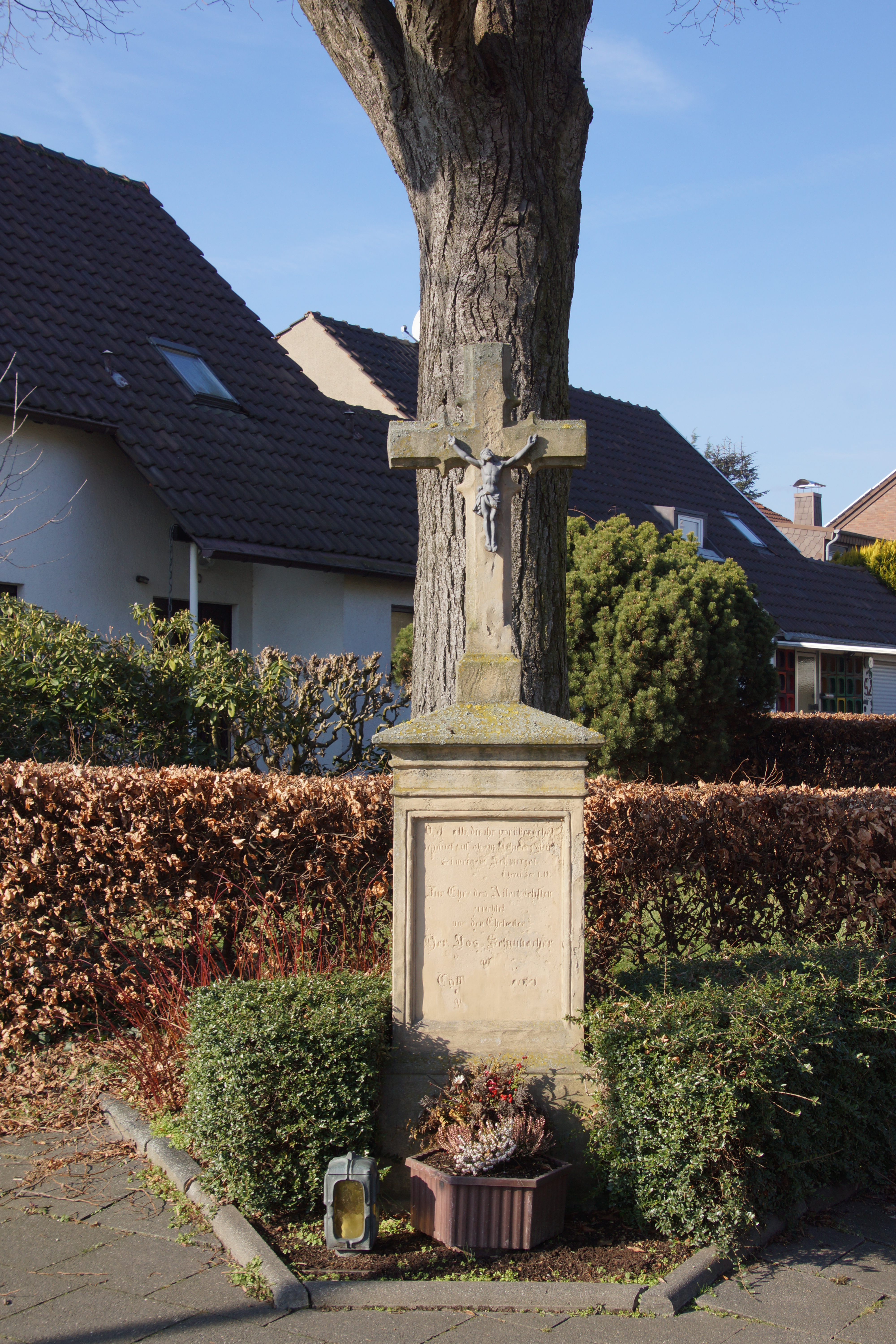 Bildstock in Frechen, Buschbell, Im Wingert/Ulrichstraße This is a photograph of an architectural monument. 136